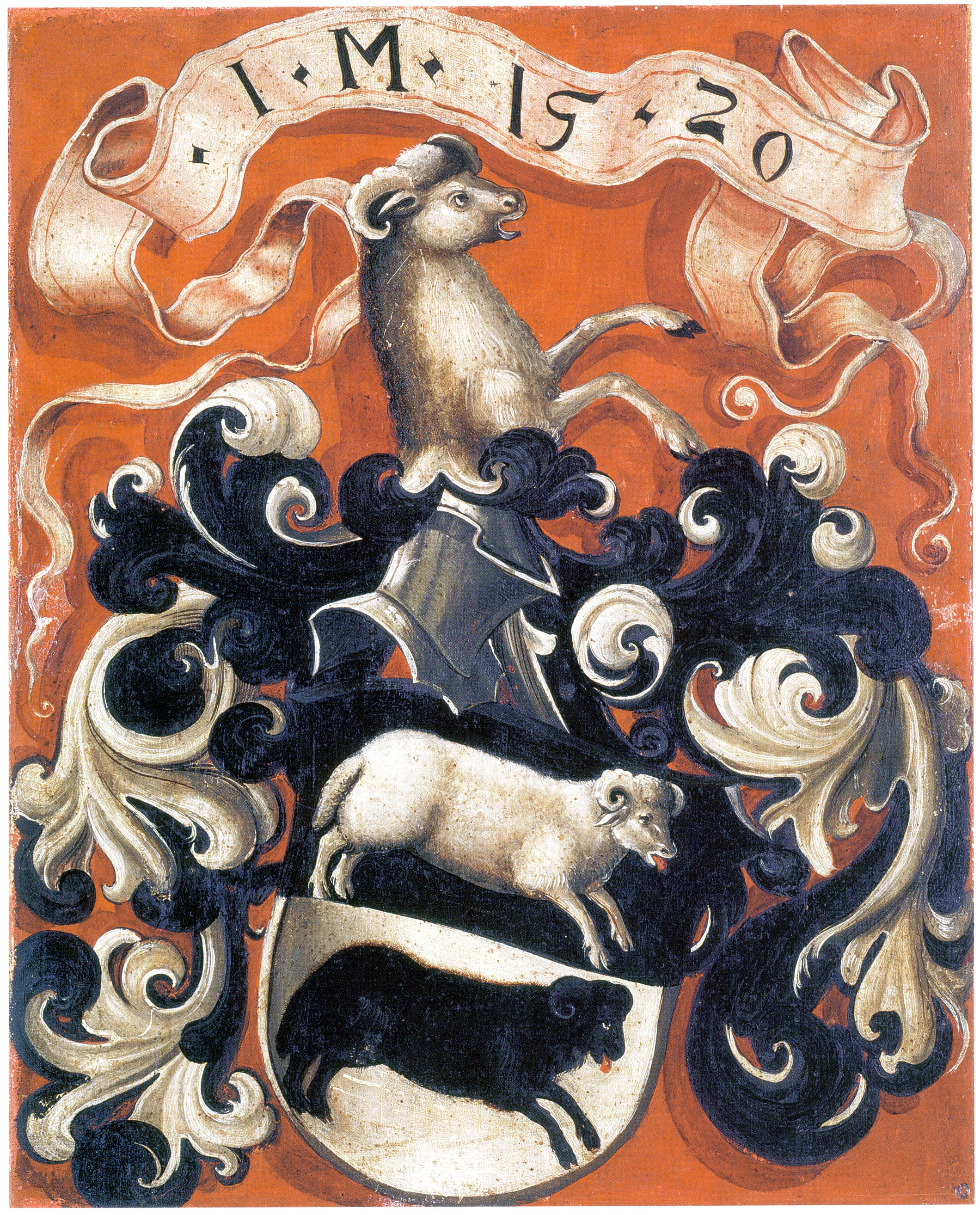 Wappen der Familie Meyer zum Hasen, Rückseite des Bildnisses des Jakob Meyer zum Hasen von Hans Holbein d. J., Basel, Kunstmuseum, Inv.Nr. 312